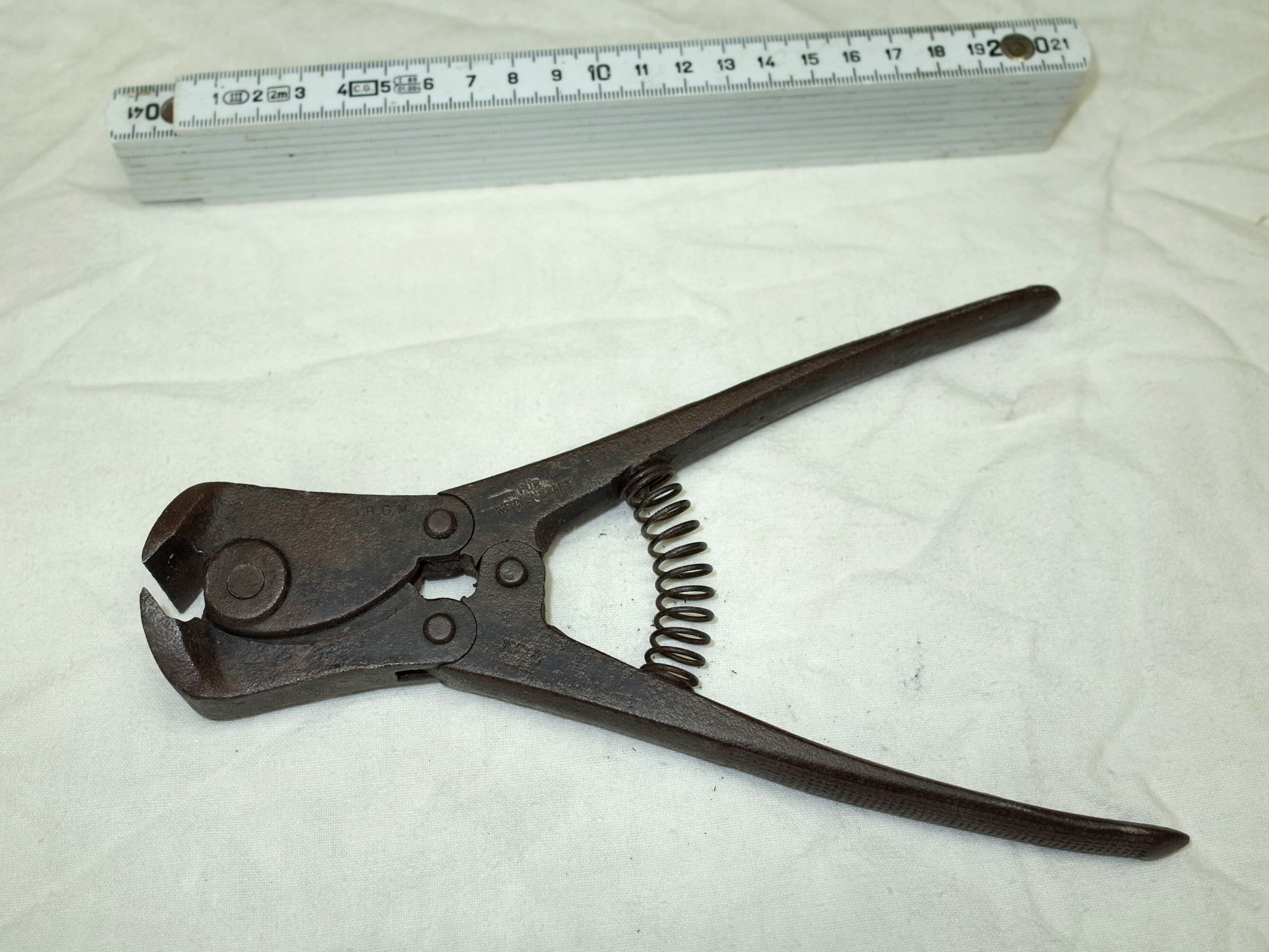 Hebelvornschneider, Maße: L 255 x B 45 x H 15-32 mm. Schrift auf der Zange: D.R.G.M.[1] ; FÜR WEICHEN DRAT (weitere Auführungen sind für harten Draht und mit schmalen Kopf für Fahradspeichen, Quelle: SUDAG Werzeugkatalog 1925) Der Firmenname auf dieser Zange ist nicht mehr lesbar.